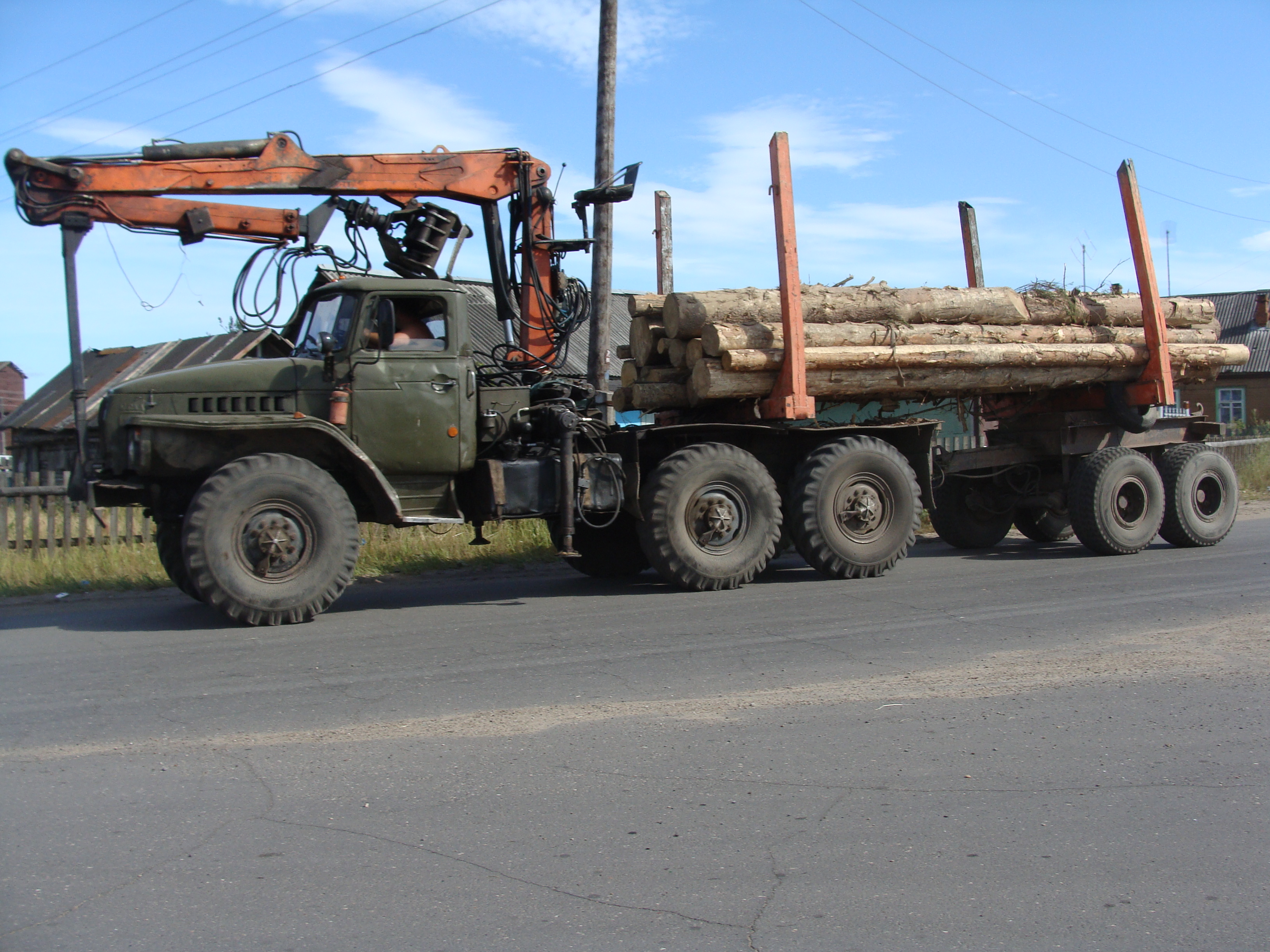 п. Черемушский Котласского района Архангельской области